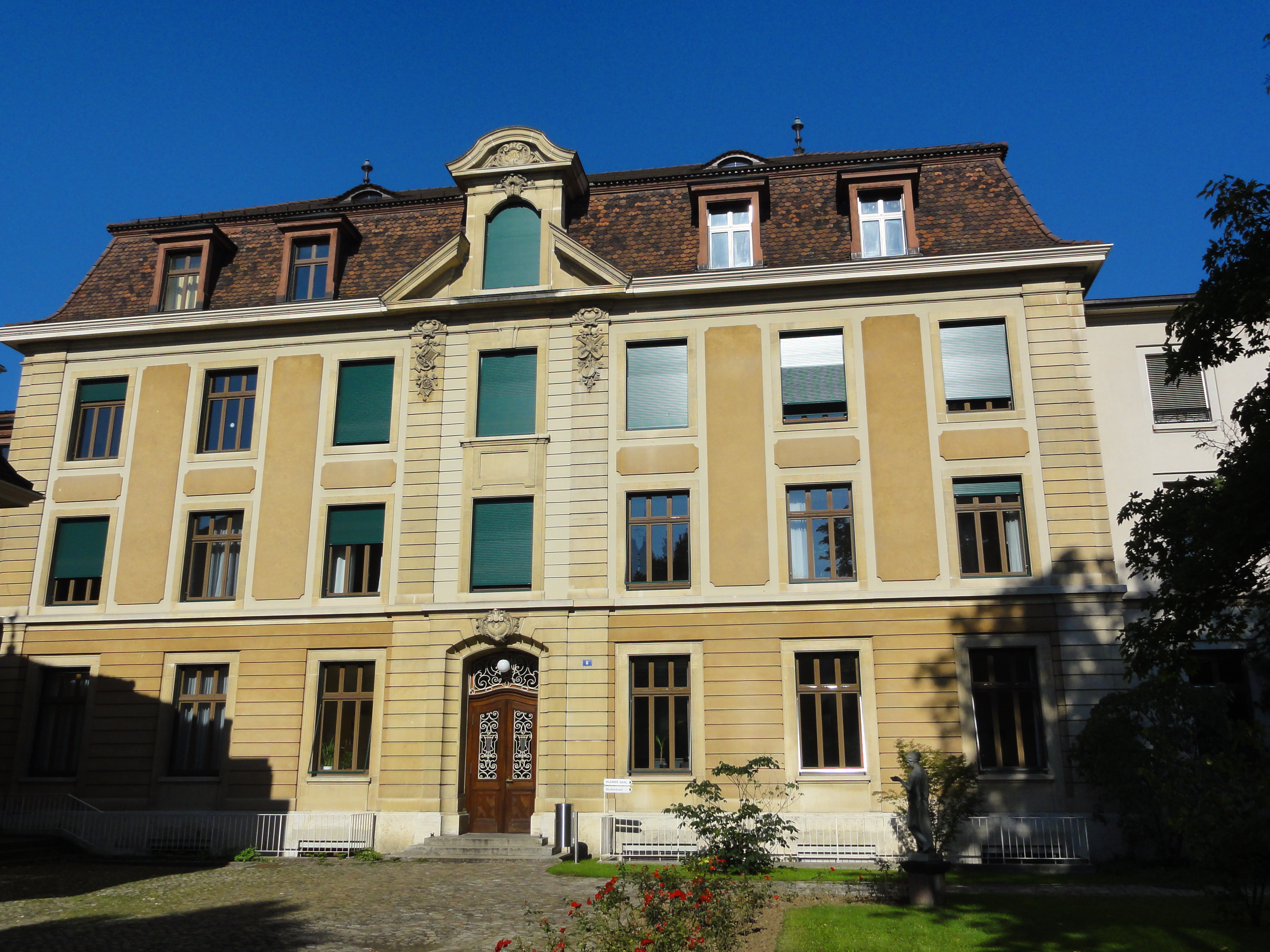 Basel BS — Leonhardsstrasse 6